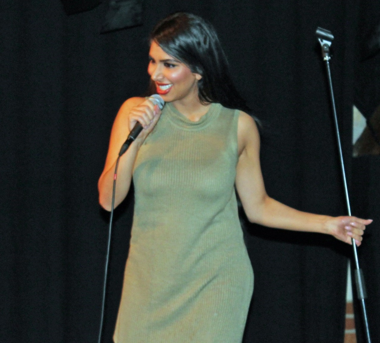 Författaren och ståupp-komikern Melody Farshin